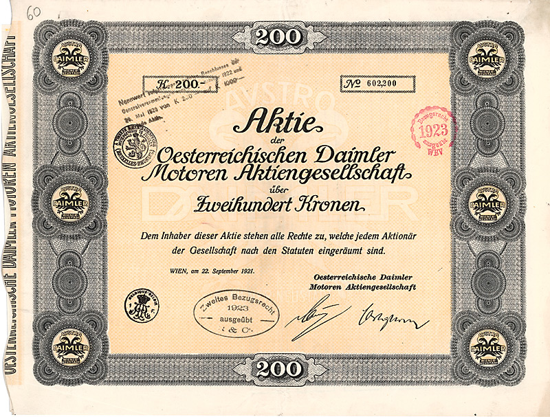 Aktie über 200 Kronen der Oeserreichischen Daimler Motoren AG vom 22. September 1921